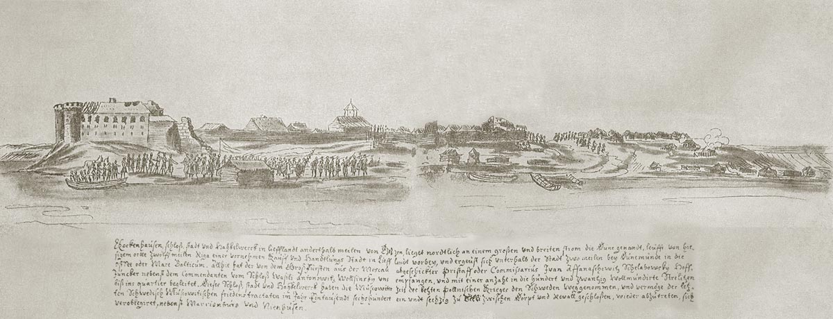 Царевичев Димитриев городок (Кокенгузен)